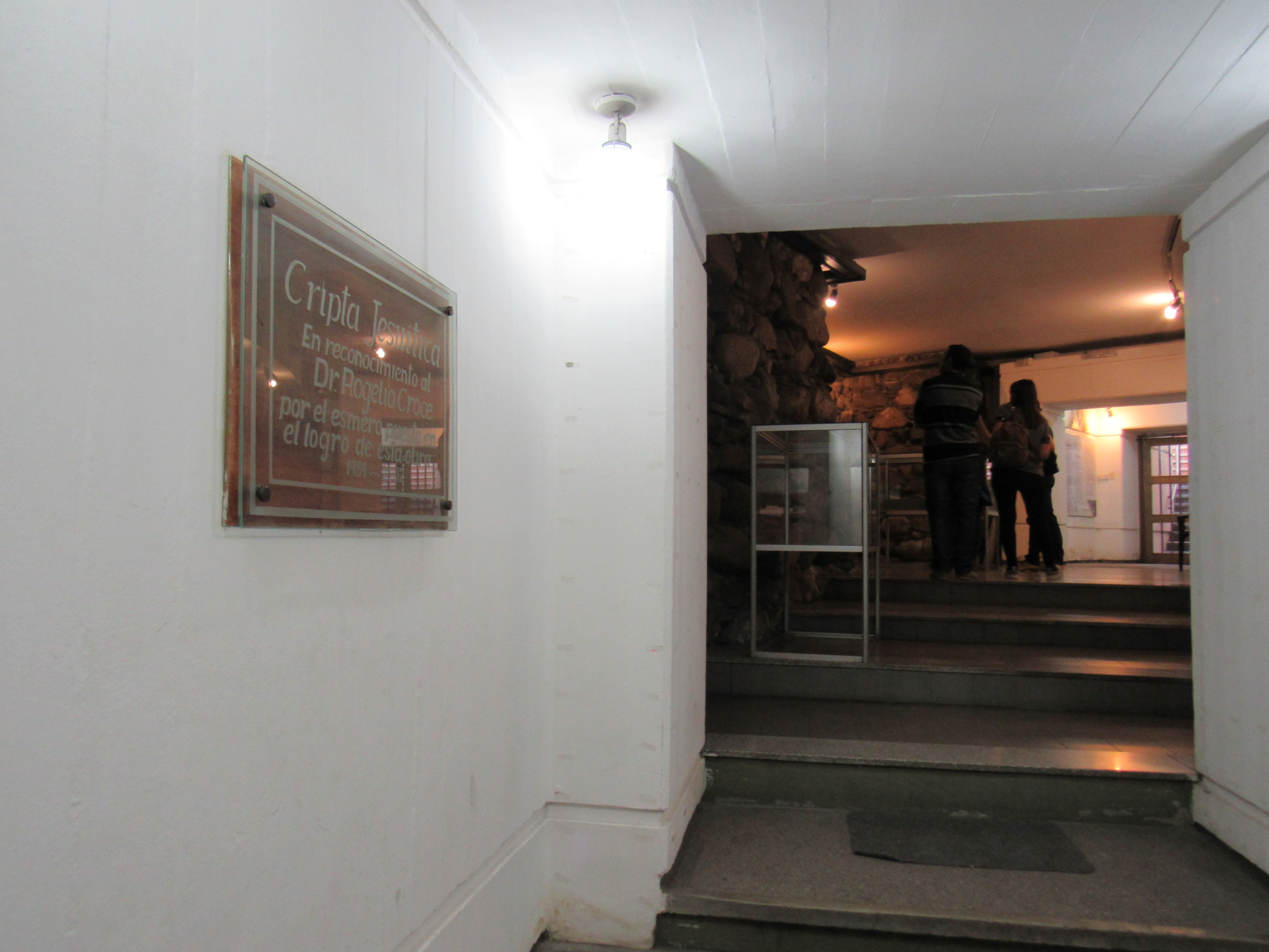 La Cripta Jesuítica es la ruina soterrada de lo que alguna vez fue el Noviciado Jesuítico de Córdoba, Argentina. Recuperada en 1989 como museo.